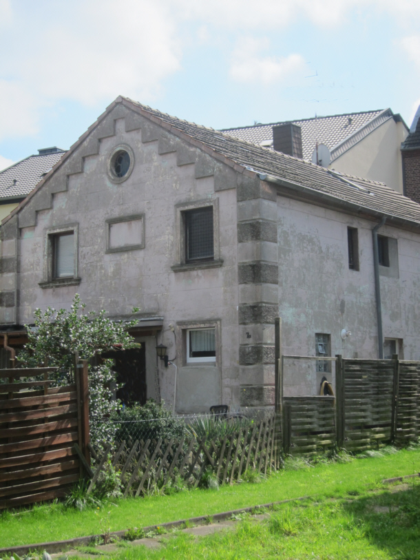 former synagoge in Oberhausen-Holten, now a private residence